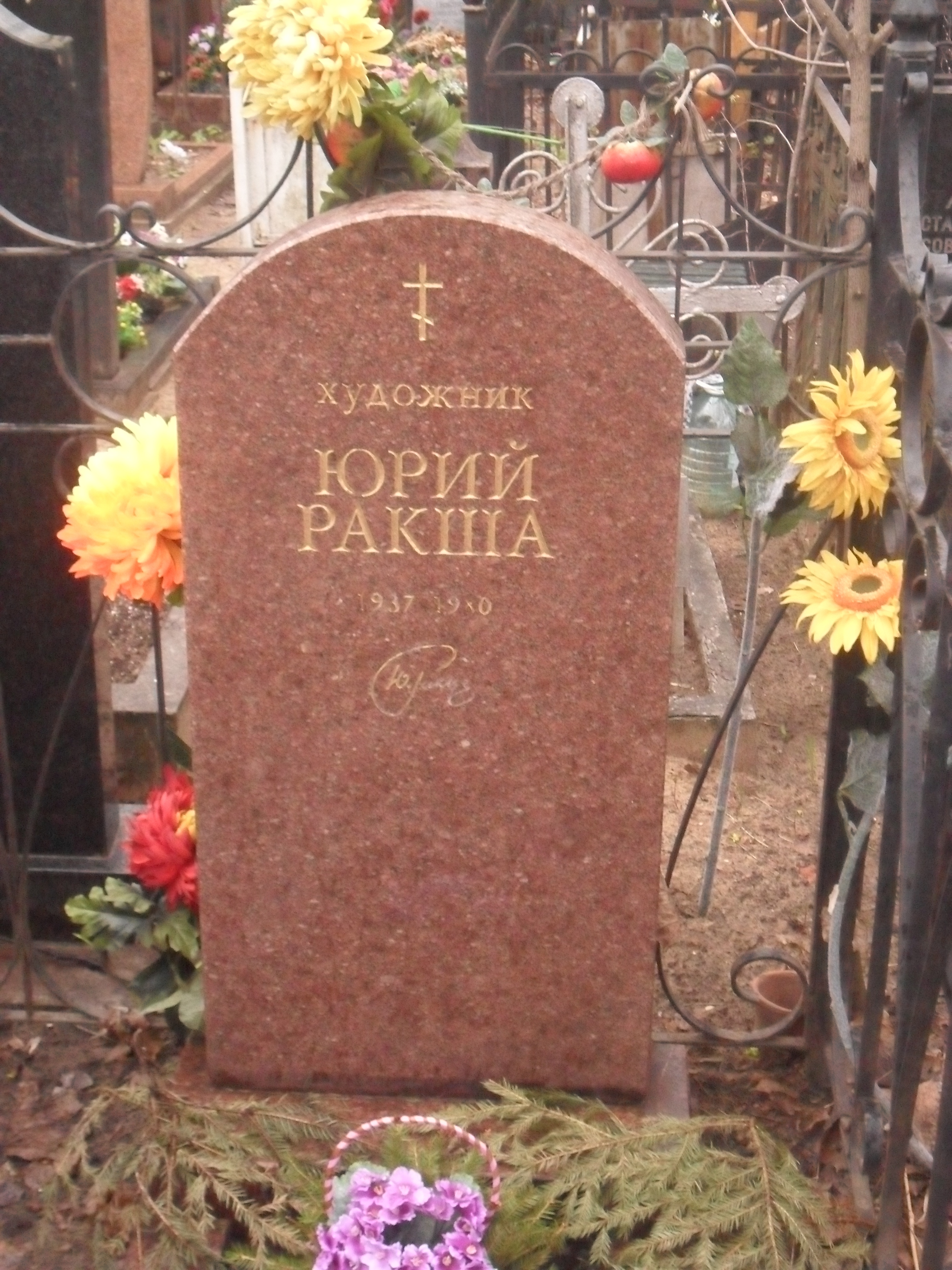 Могила художника Юрия Ракши на Ваганьковском кладбище Москвы.